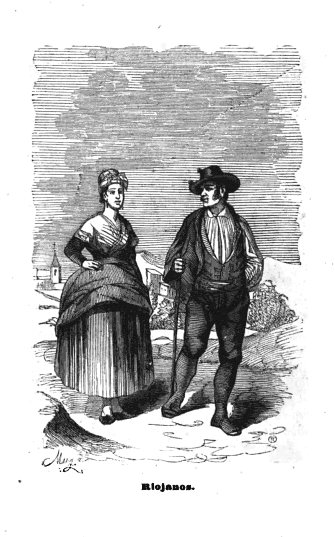 Riojanos (habitantes de La Rioja/provincia de Logroño, España) según grabado de 1845.